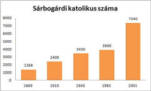 A római katolikusok száma Sárbogárdon bizonyos években.